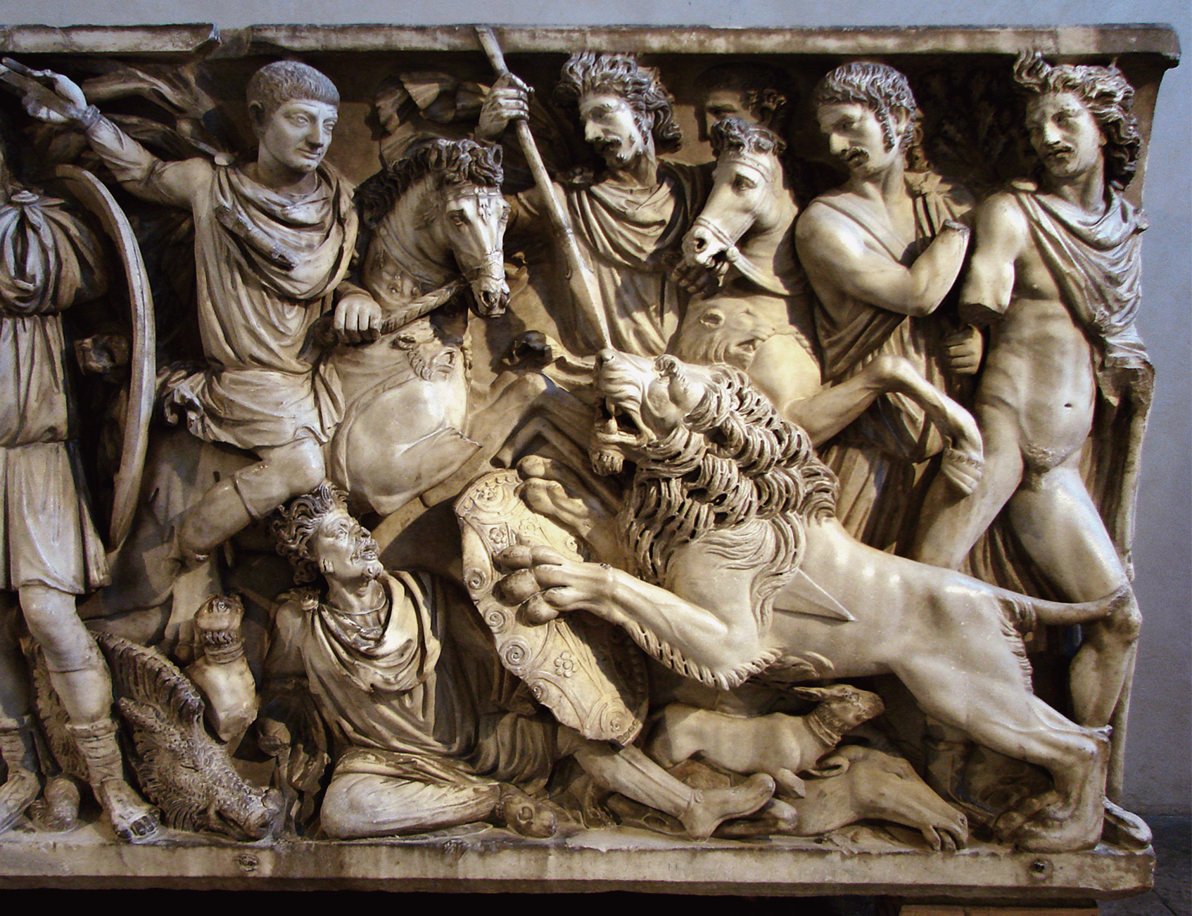 Le Tombeau de Jovin. Sarcophage romain du 3ème siècle, apporté à Reims par Flavius Jovinus, général en chef de l'armée romaine en Gaule sous le règne de Valentinien 1er (règne de 364 à 375); il a acheté à Rome ce sarcophage sculpté un siècle plus tôt et il a fait retailler la tête du cavalier à son effigie. Musée Saint-Remi à Reims.